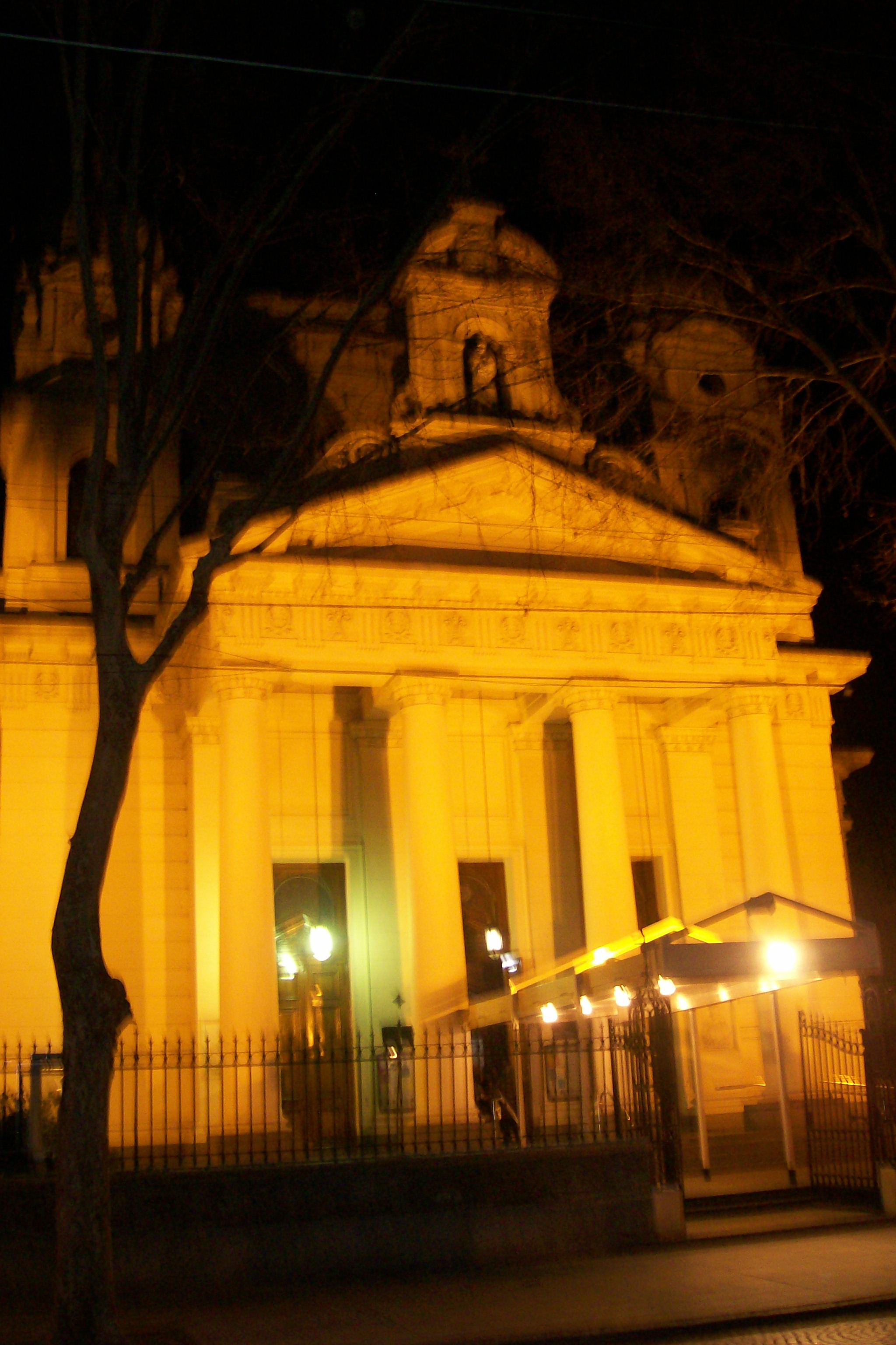 Basilica Menor San Antonio de Padua. Lincoln 3751, Villa Devoto, Buenos Aires.